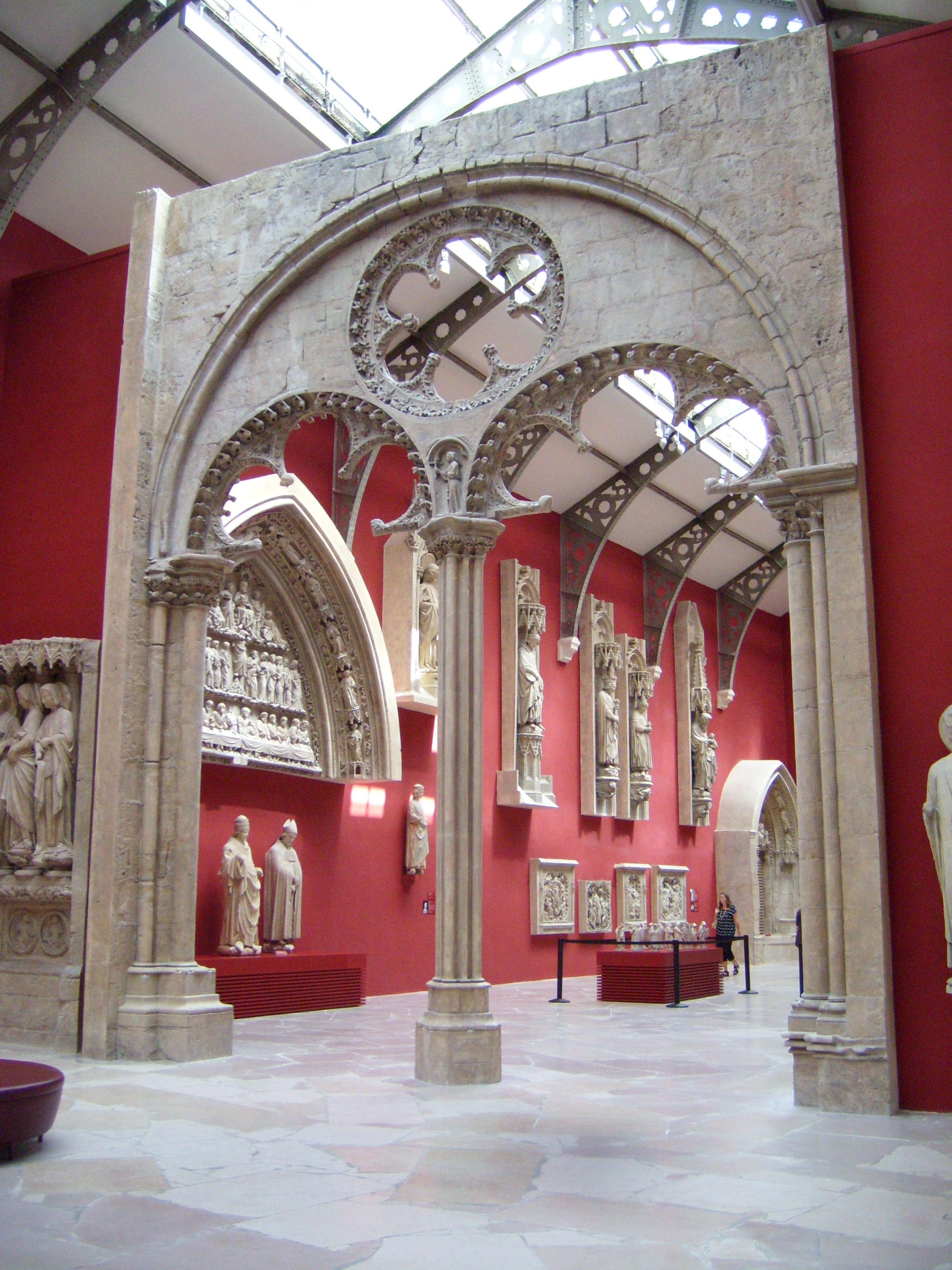 Galerie des Moulages, Musée des Monuments français, Paris